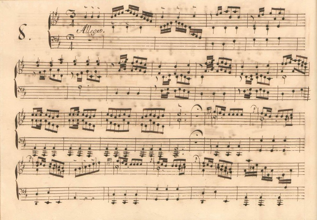 La sonate K. 491, telle qu'elle se présente dans le manuscrit de Parme, volume XIV no. 8.